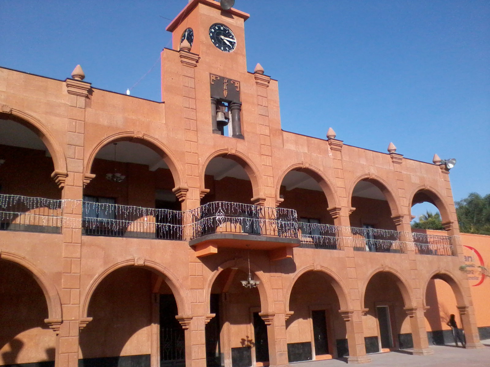 fachada del ayuntamiento de miacatlan